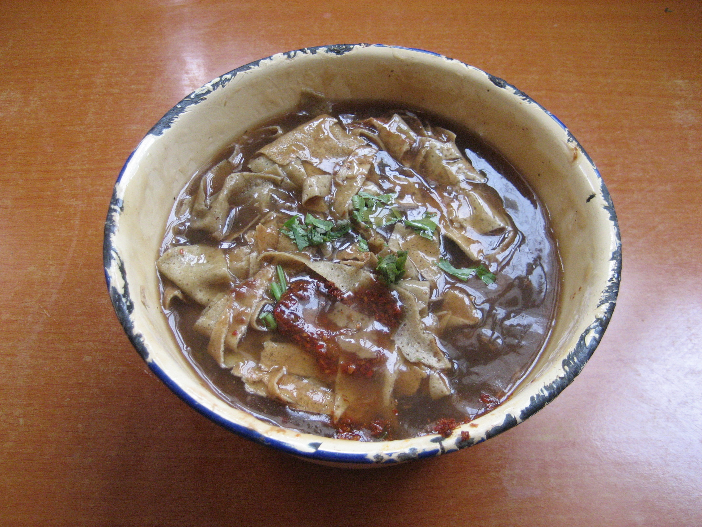 天津鍋巴菜